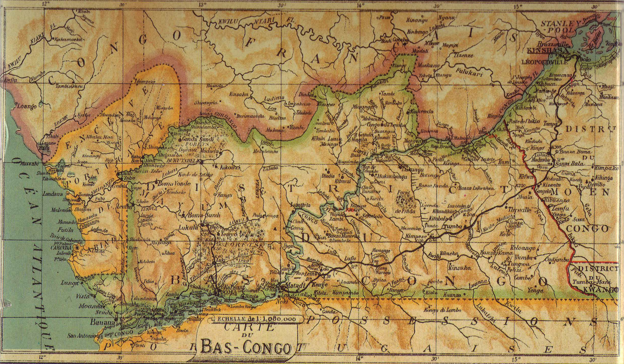 Carte du Bas Congo, encadré de Carte du Congo Belge, publiée par J. Lebègue & Cie., imprimée par J. E. Goossens, Bruxelles